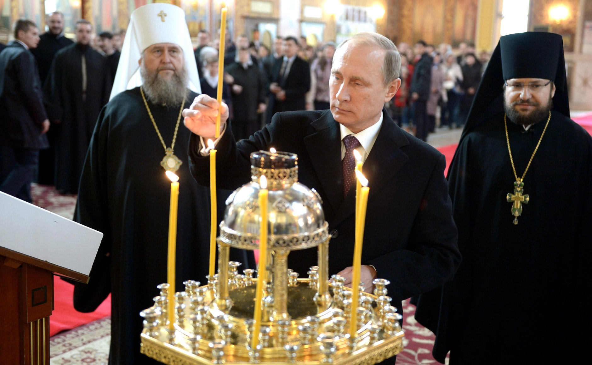 Посещение Президентом России Владимиром Путиным Свято-Успенского кафедрального собора в Нур-Султан. Его сопровождают митрополит Астанайский и Казахстанский Александр и архимандрит Сергий (Карамышев)